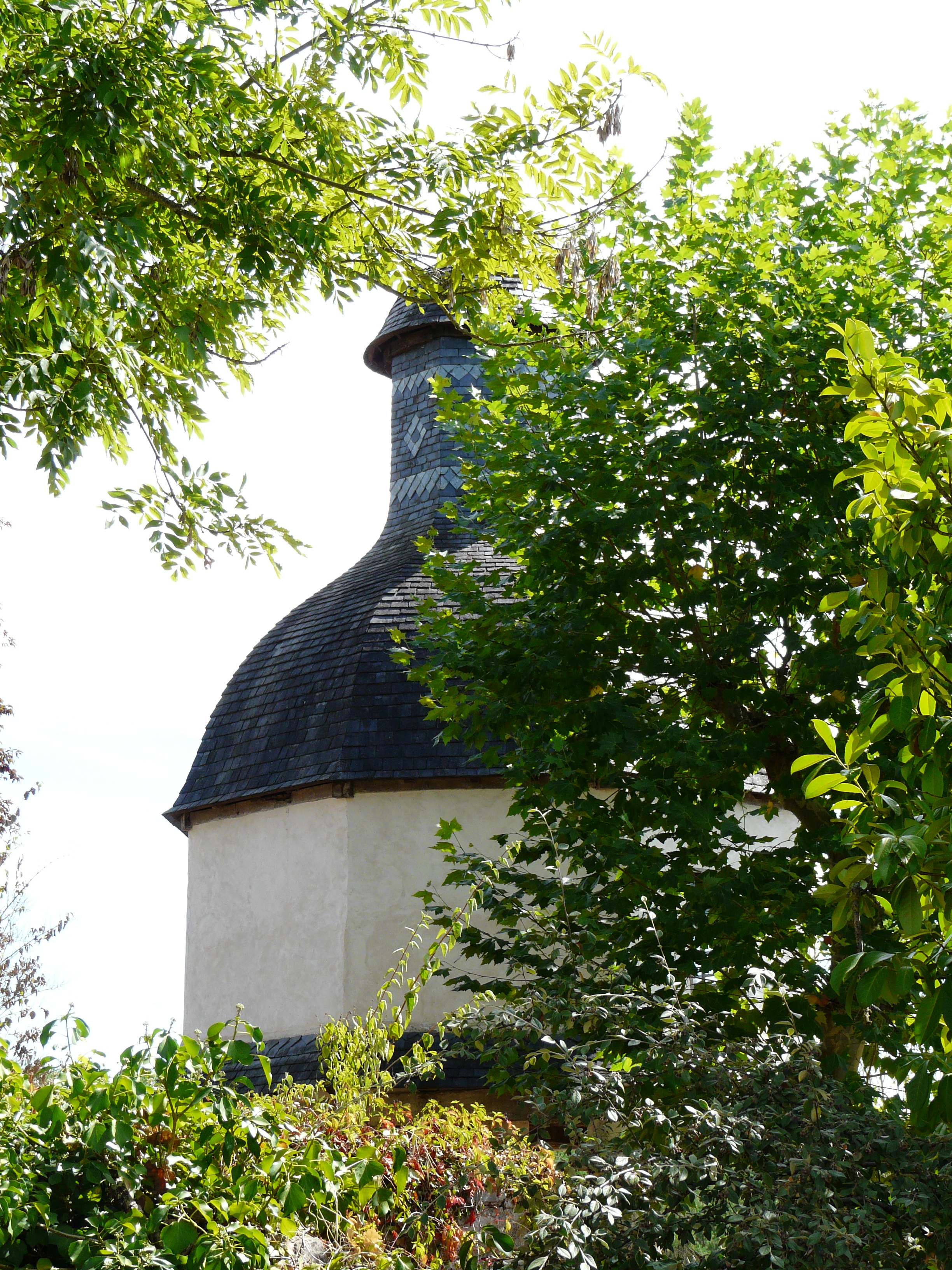 Le pigeonnier du château de la Chapoulie, Peyrignac, Dordogne, France.